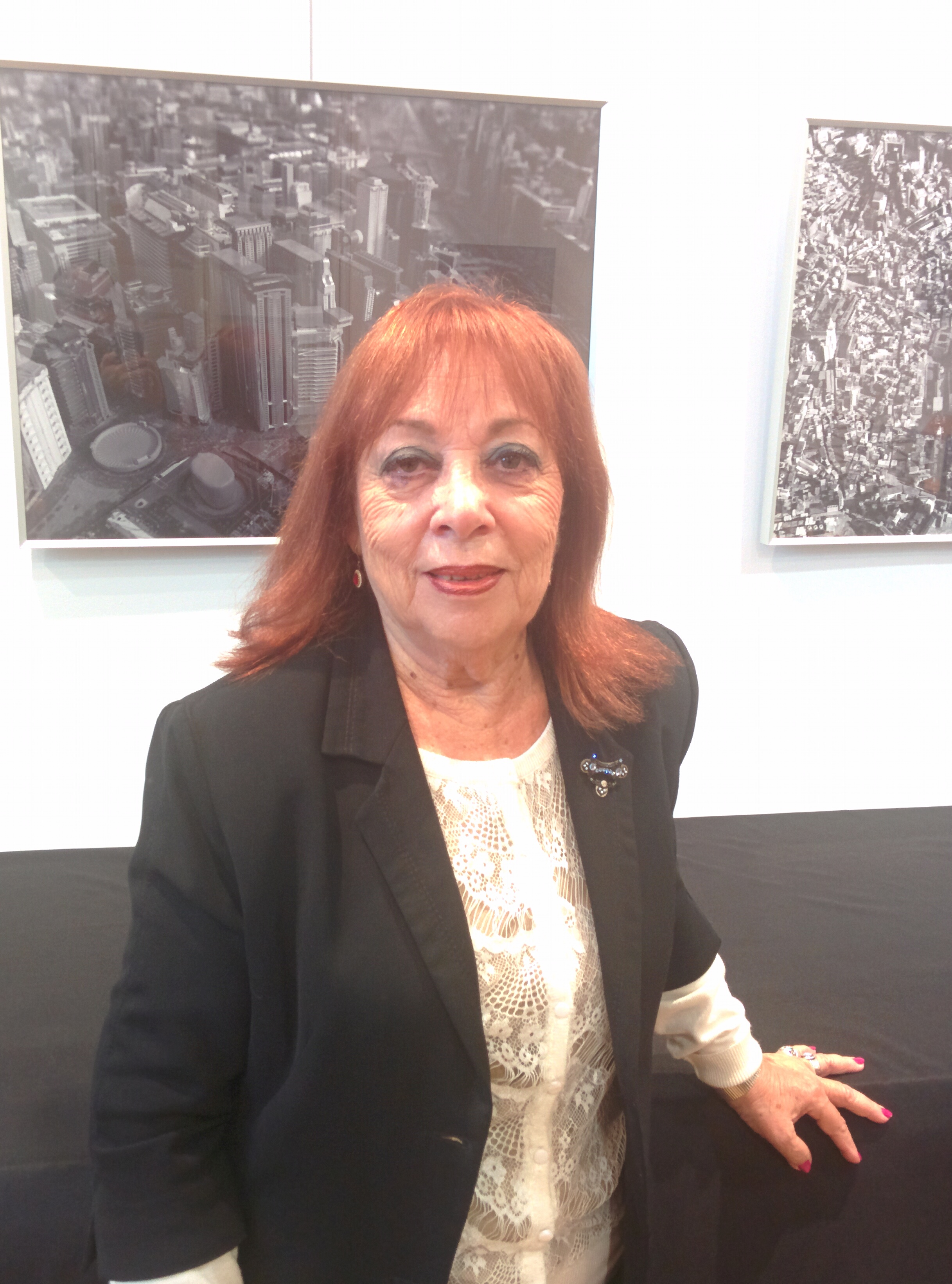 Margalit Matitiahu en Madrid en 2017.